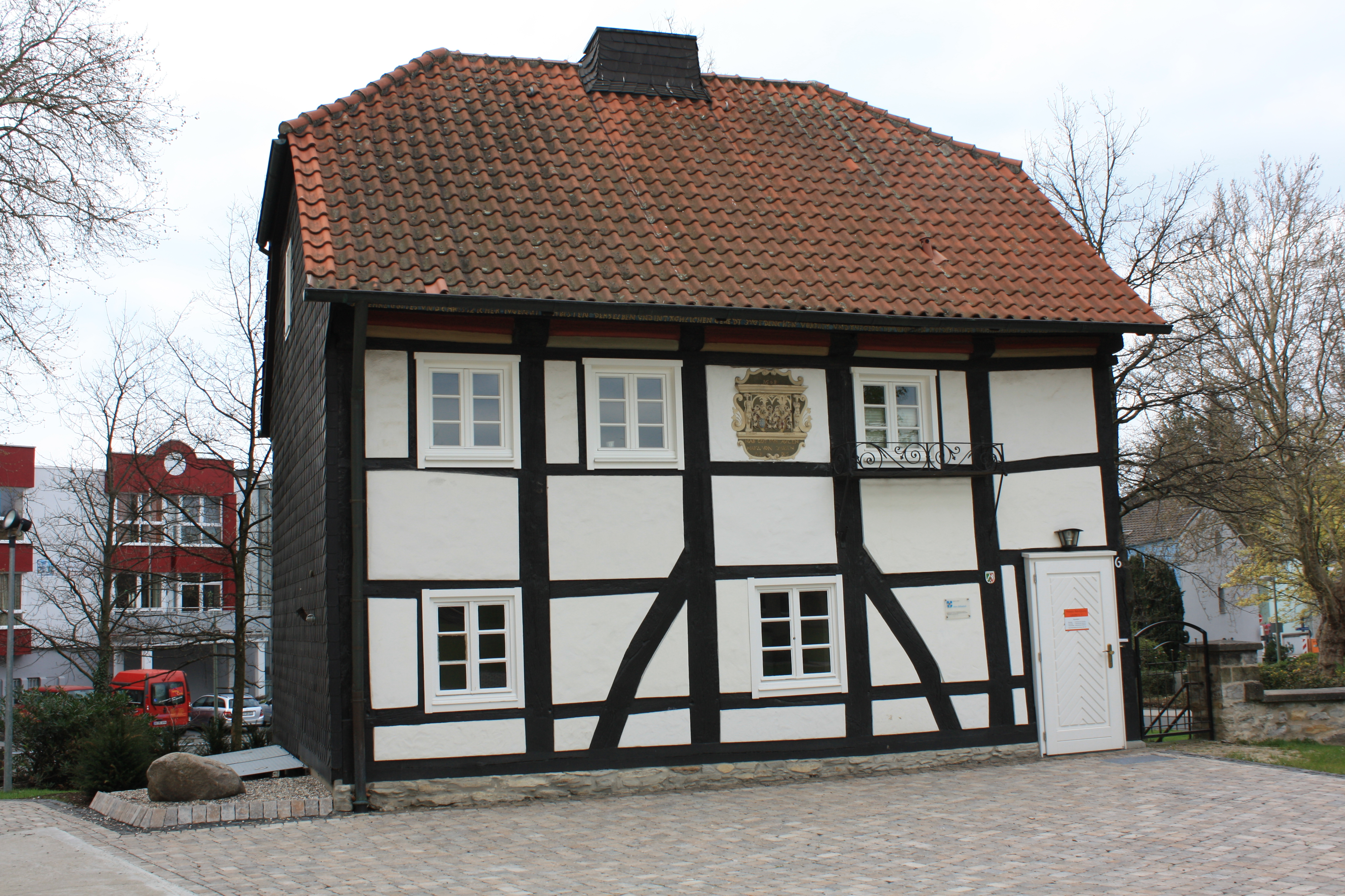 Stiftsschule im Frauenstift Geske